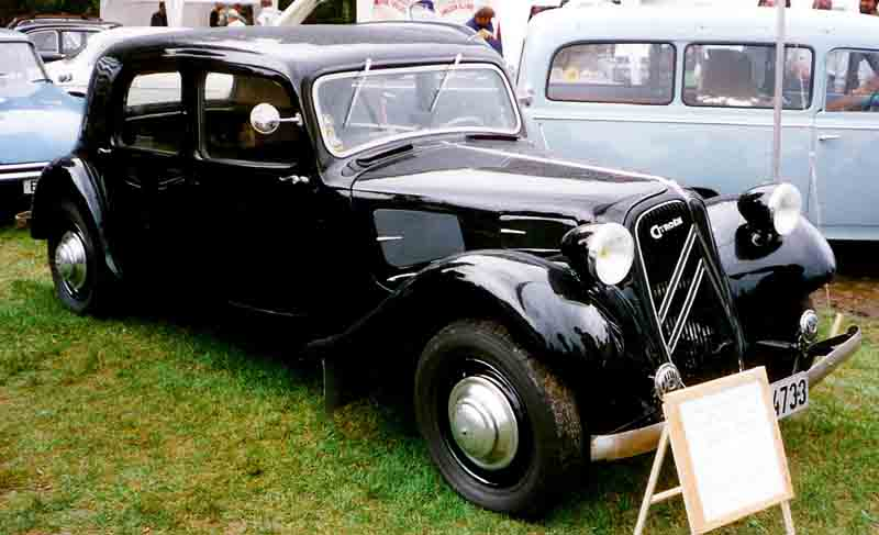 Citroen Berline